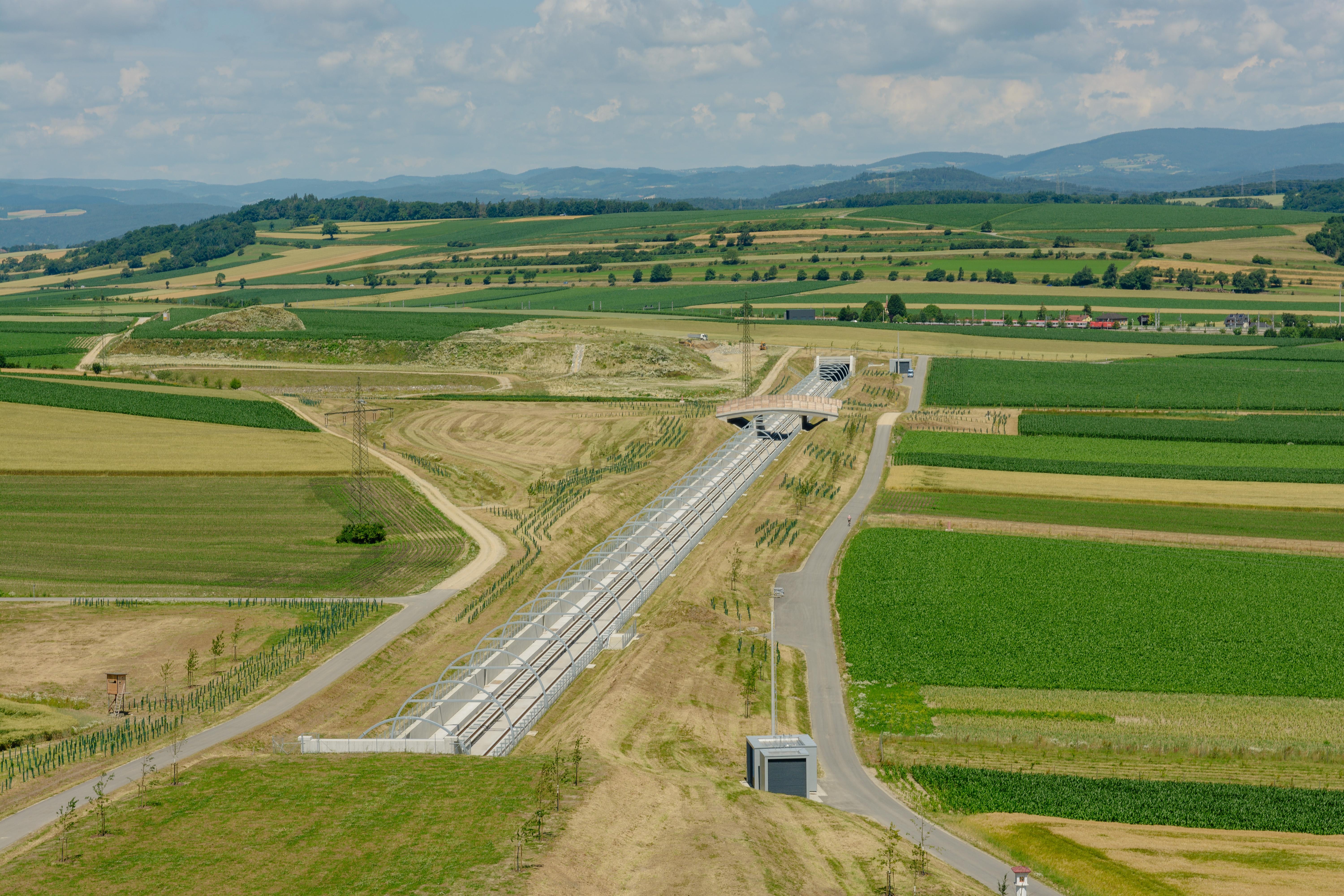 Güterzugumfahrung St.Pölten, Radleitenwanne zwischen Bründlkapellentunnel und Radleitentunnel